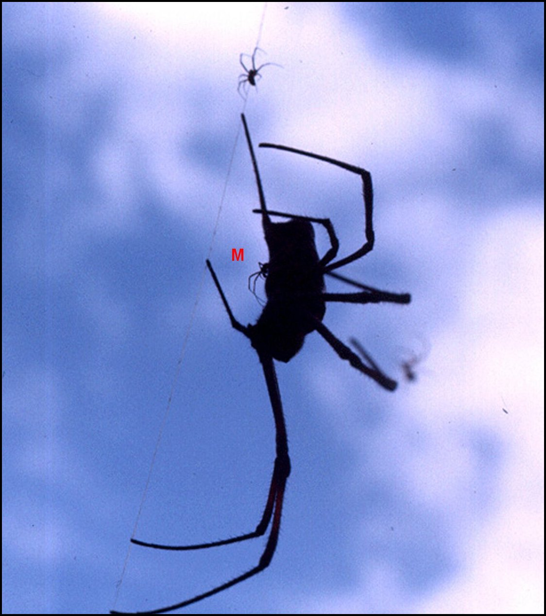 Nephila inaurata : une femelle et trois mâles "pygmées" à contrejour. L'un d'eux (M) est en train de s'accoupler. Mombasa, Kenya. D'après une diapositive.